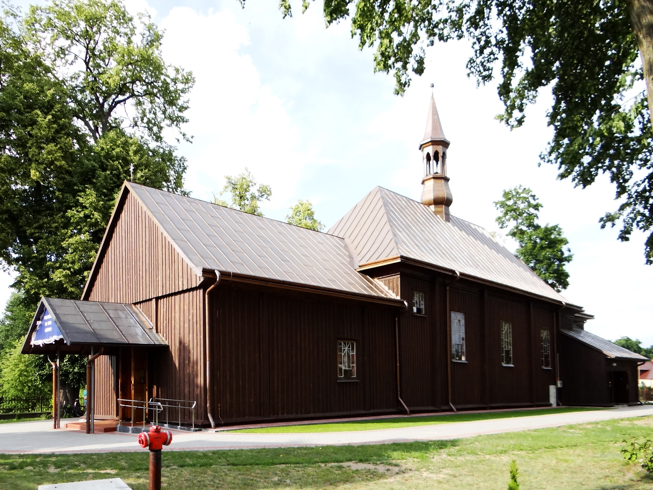 Zdjęcie wykonane w miejscowości Kurzyna Średnia, powiat niżański.